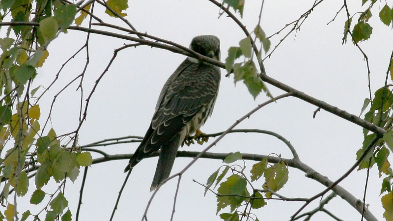 Hobby Falco subbuteo, immature; Rheinspitz, Vorarlberg, Austria